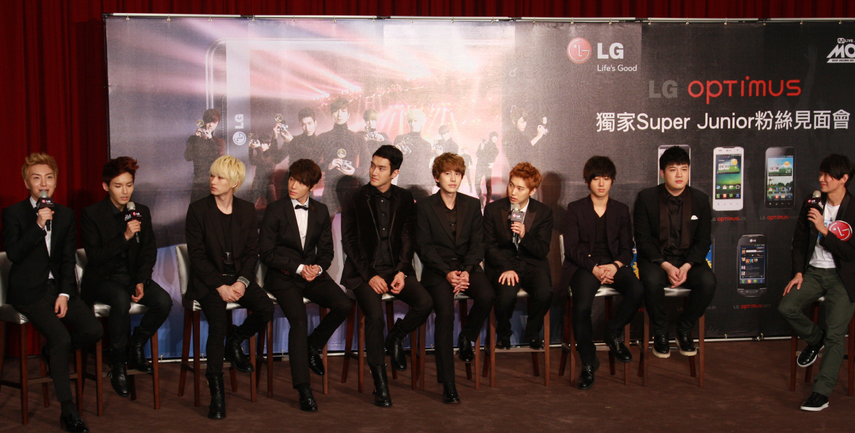 LG전자는 26일 저녁 대만 카오슝市에 위치한 '카오슝 아레나(Kaohsiung Arena)'에서 1만3천여 명의 관객이 운집한 가운데 열린 CJ주관 'M Live 콘서트'를 공식 후원했다. 콘서트에 앞서 공연장 인근 '샤또 데 신(CHATEAU de CHINE)' 호텔에서 LG 스마트폰 사용 고객 200명을 특별 초청해 'LG 옵티머스 슈퍼주니어 팬미팅' 행사를 개최했다. 슈퍼주니어 멤버 이특이 질문에 답변하고 있다. ※ LG전자 뉴스룸 에서 관련 보도자료를 확인실 수 있습니다.